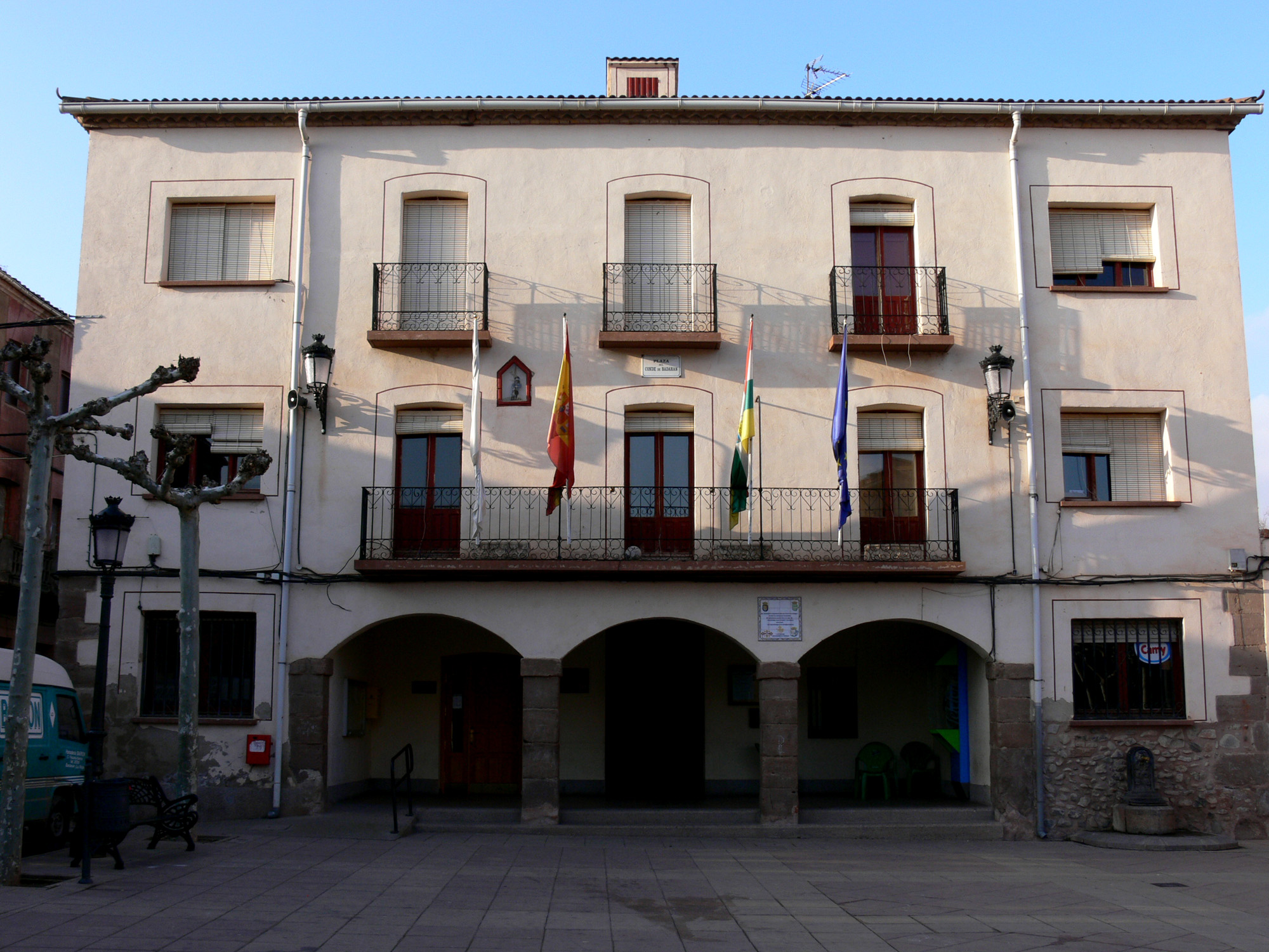 Vista del centro de la localidad riojana de Badarán.